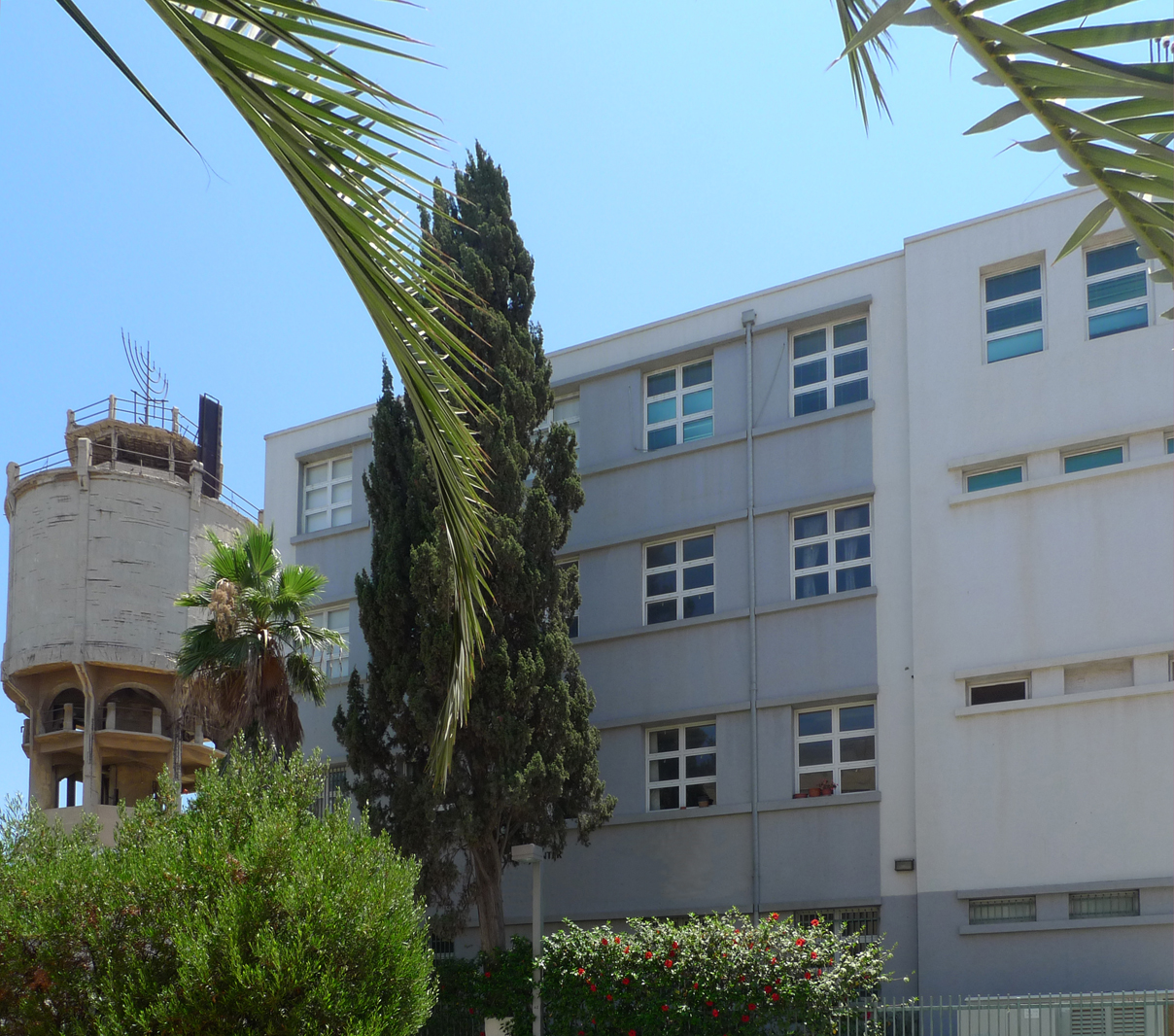 צילום תיכון עירוני ה'בשנותיו הראשונות ברחוב מאזה בתל אביב רישיון נוצר על ידי משתמש:Michael Shefa